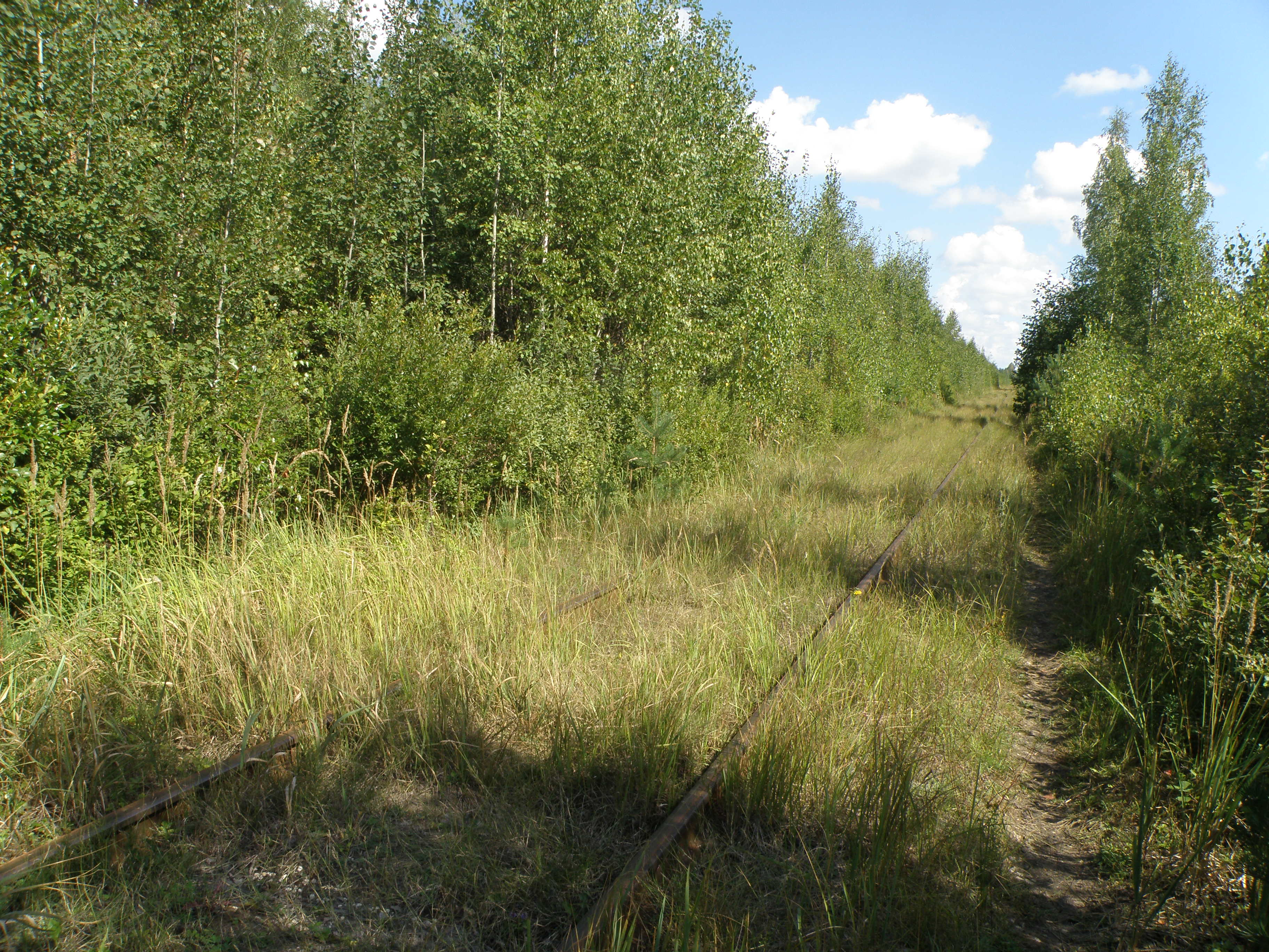 Уршельская ж.-д. ветка